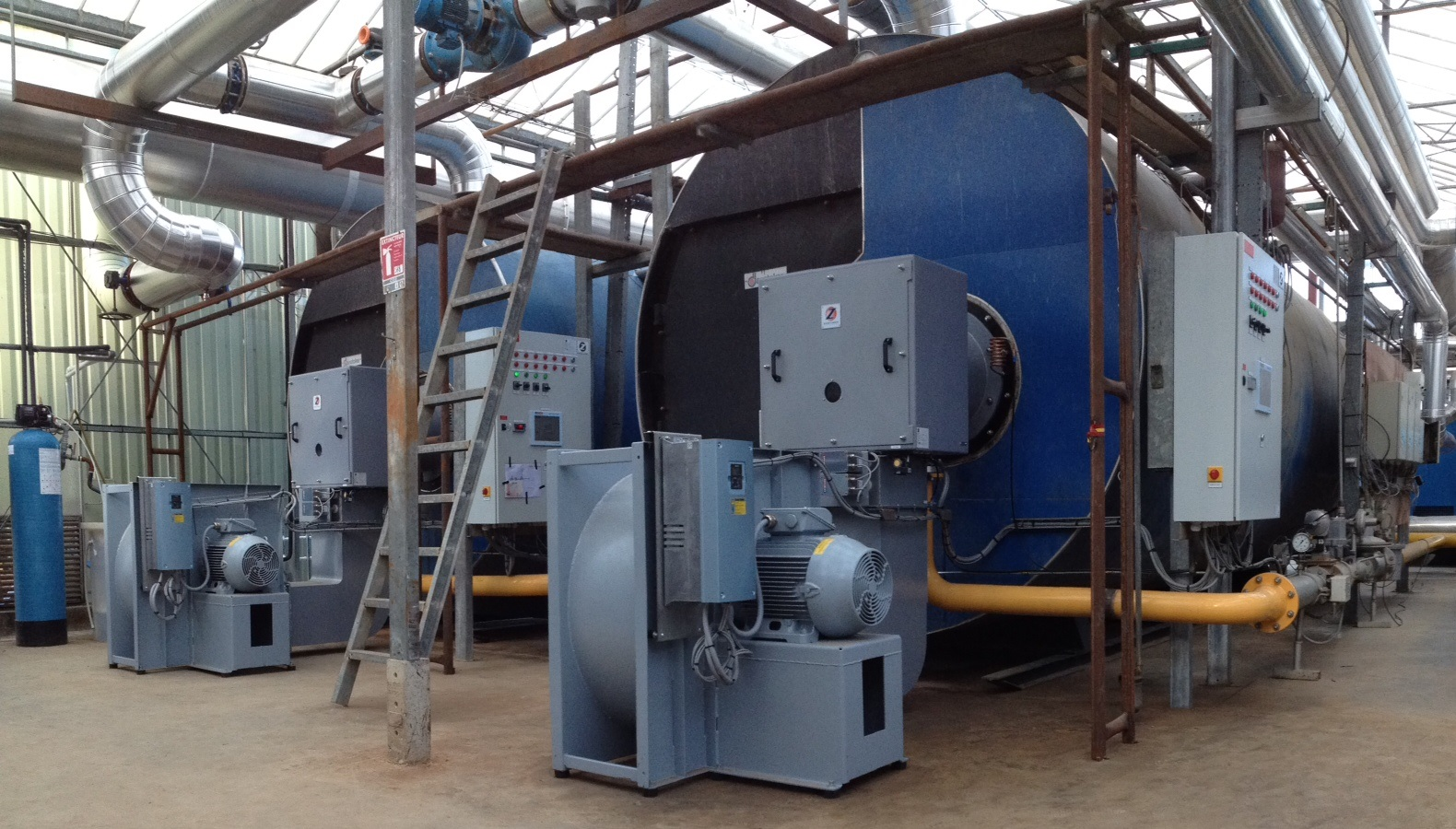 verbrandingsventilator